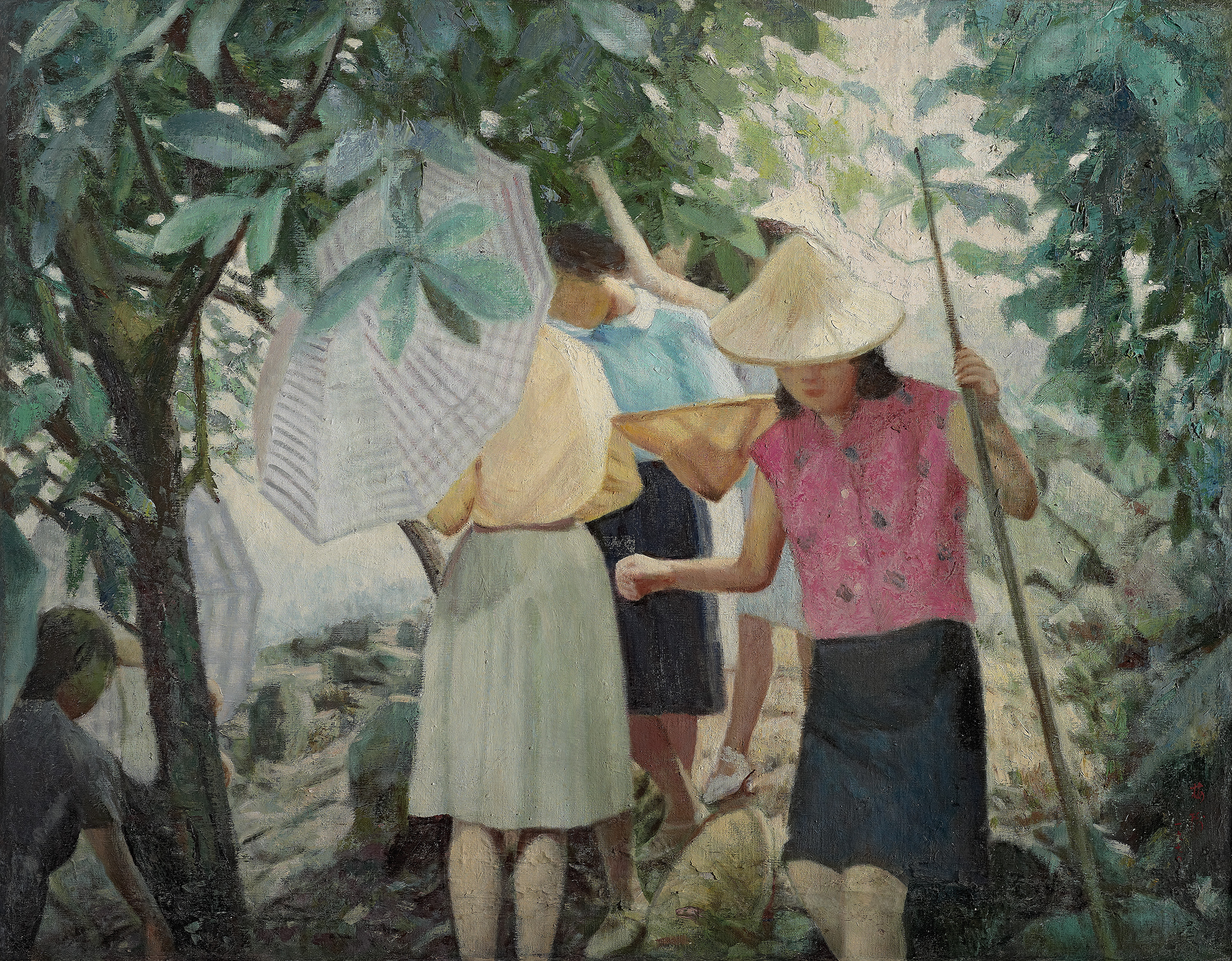 中文（台灣）: 李梅樹作品-摘蓮霧(三) 1969 油彩 畫布 摘蓮霧的工作，透過台灣婦女的肢體語言讓人有「地域、季節、人文」的聯想。少女左右動作稍有變化，左單手，右雙手摘。